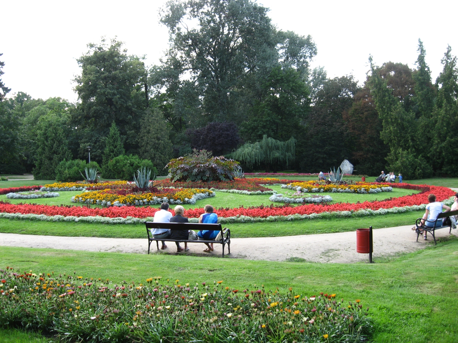 Park w Ciechocinku koło Muszli Koncertowej